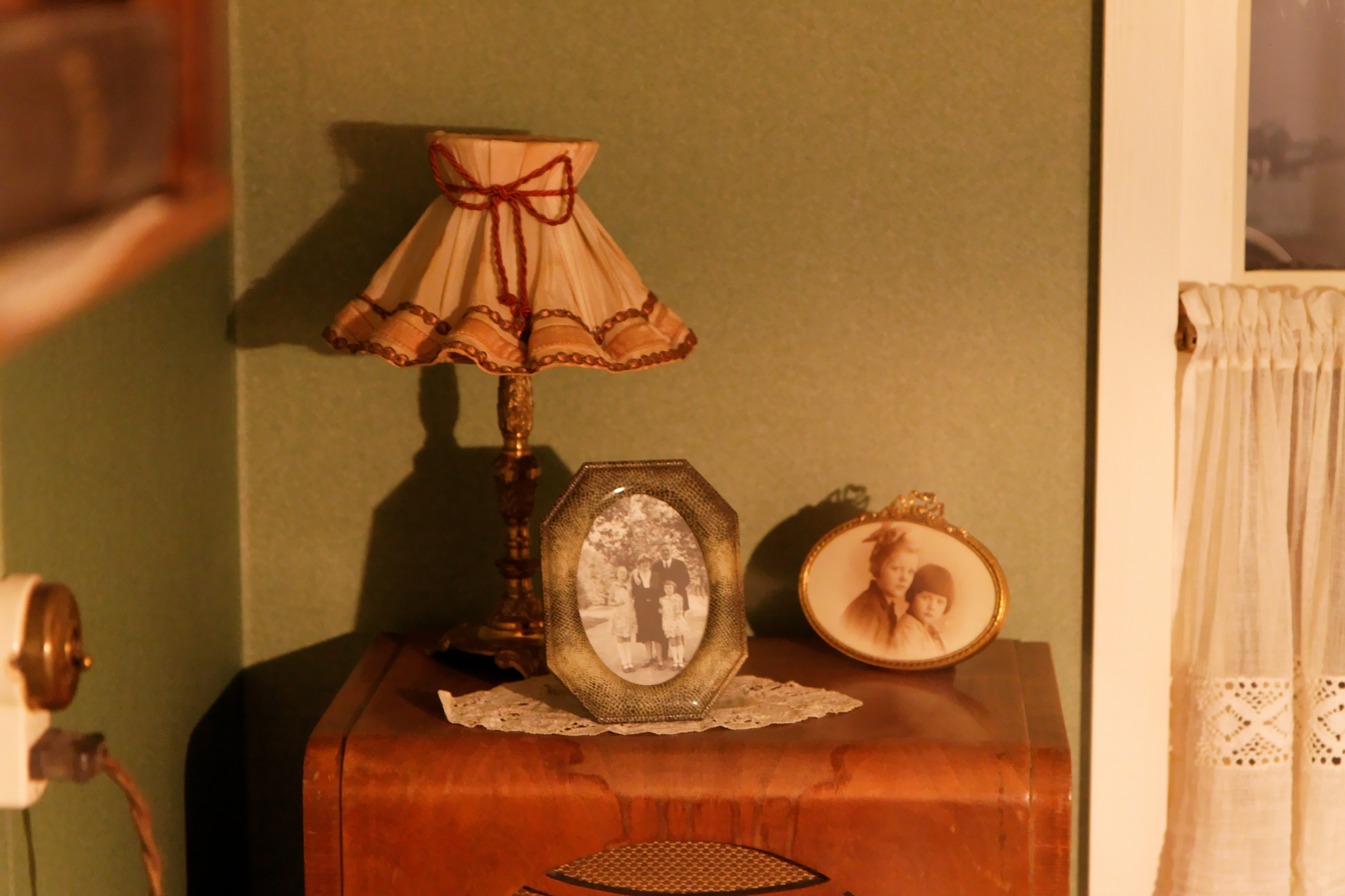 090626-113245_ 1613_50D_raw